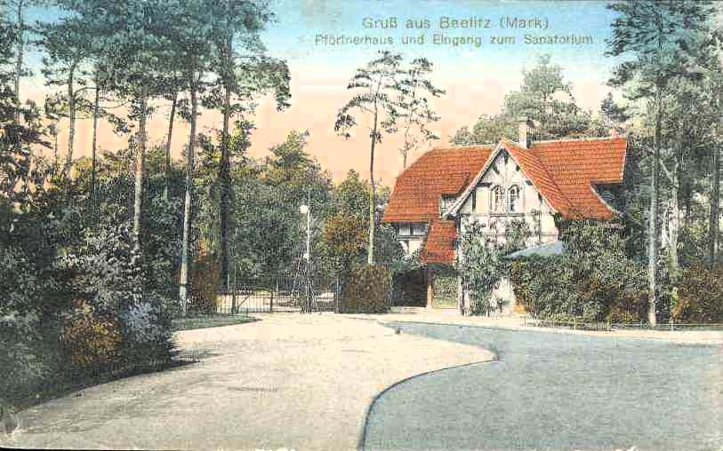 Das Pförtnerhaus der Heilstätten in Beelitz zur Zeit des Vereinslazarettes im 1. Weltkrieg